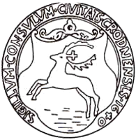 Беларуская (тарашкевіца): Пячатка Горадні